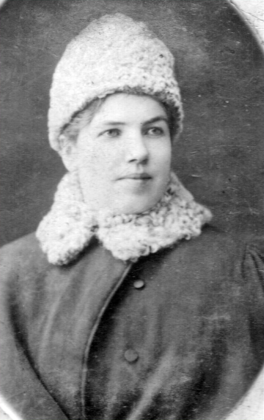 Марія Садовська-Барілотті під час перебування у Петербурзі.